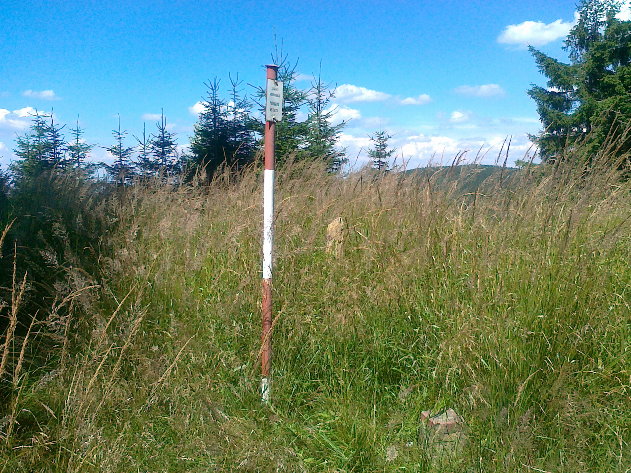 Punkt geodezyjny na szczycie góry Zaječí hora - 1012 m n.p.m.